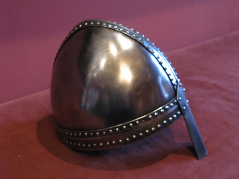 Hełm normandzki